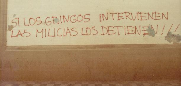 graffiti politica, Nicaragua, 1980 © photo, scan, upload; Sonett72 13:03 19 feb, 2005 (CET)